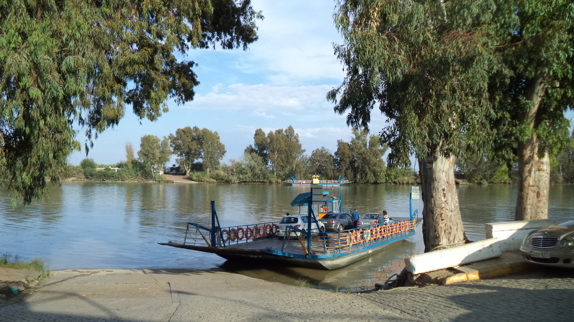 Barcaza de Coria que sirve para cruzar al municipio de Dos Hermanas y donde puede montarse el vehículo